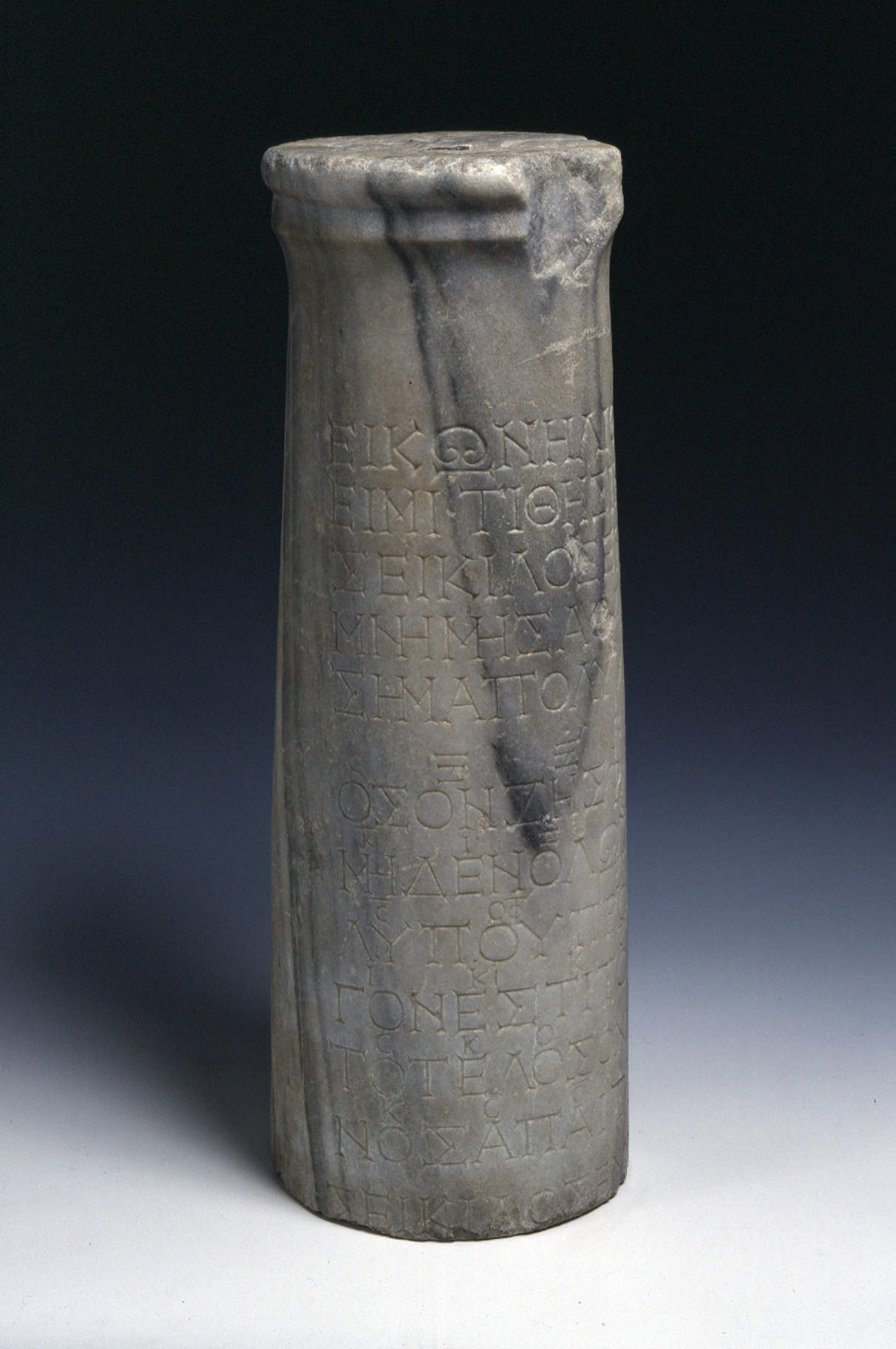 © DR.